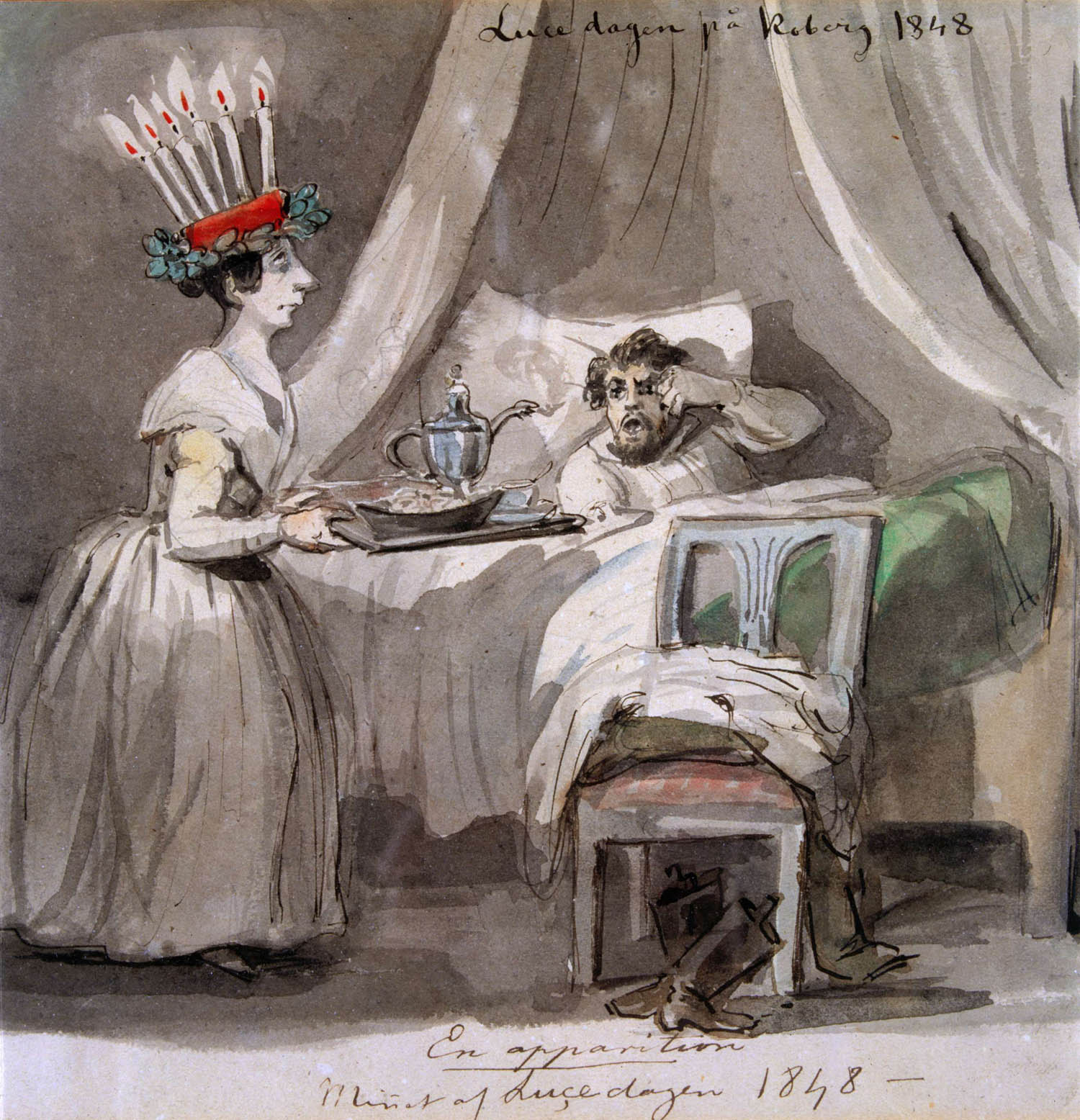 Depicted place: Västergötland, Bjärke hd, Lagmansered, Koberg (Sverige (SE))